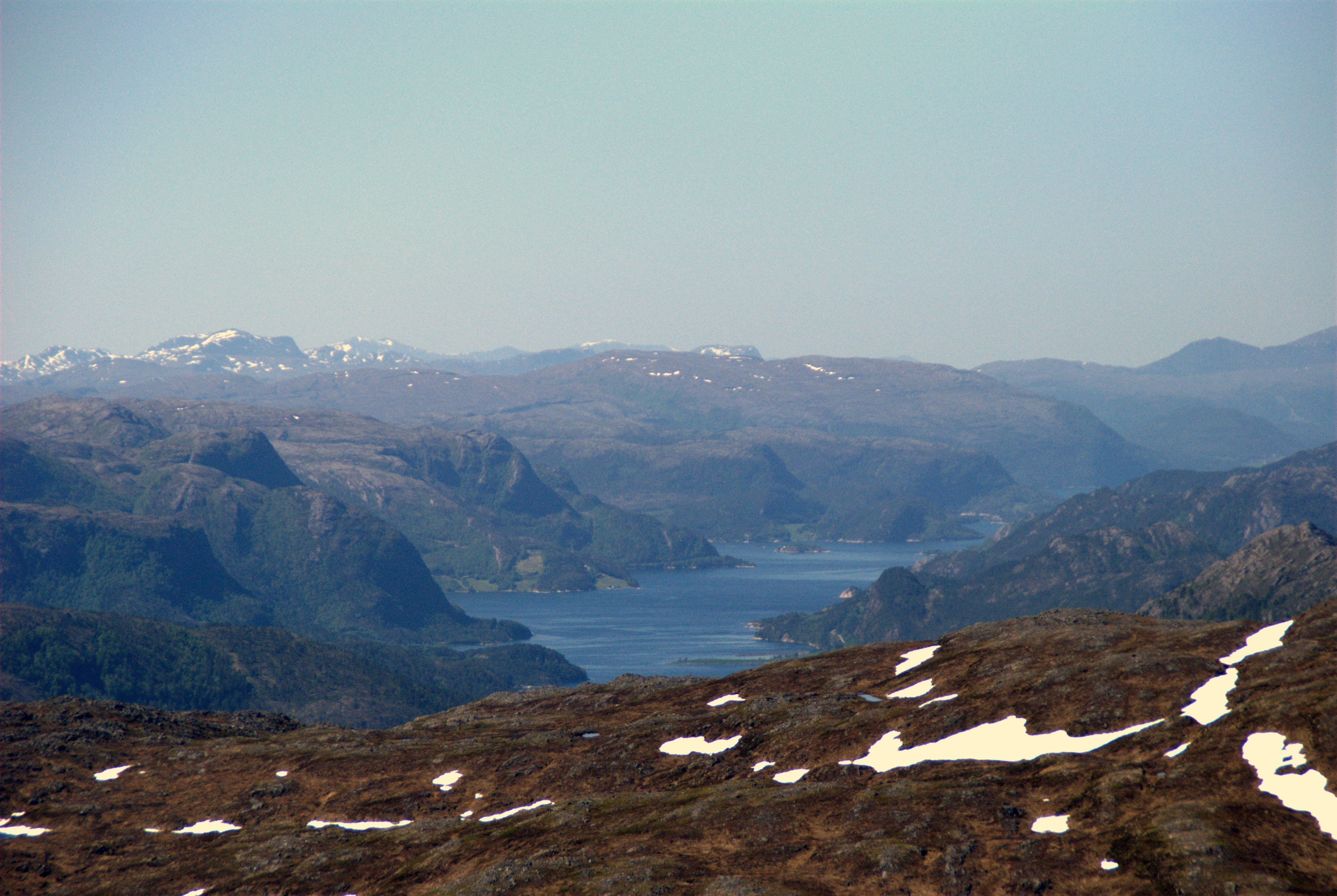 Åstfjorden i Snillfjord kommune i Sør-Trøndelag, en fjordarm av Hemnefjorden. Bilde tatt fra Hestgrovheia (656 moh) i Agdenes.